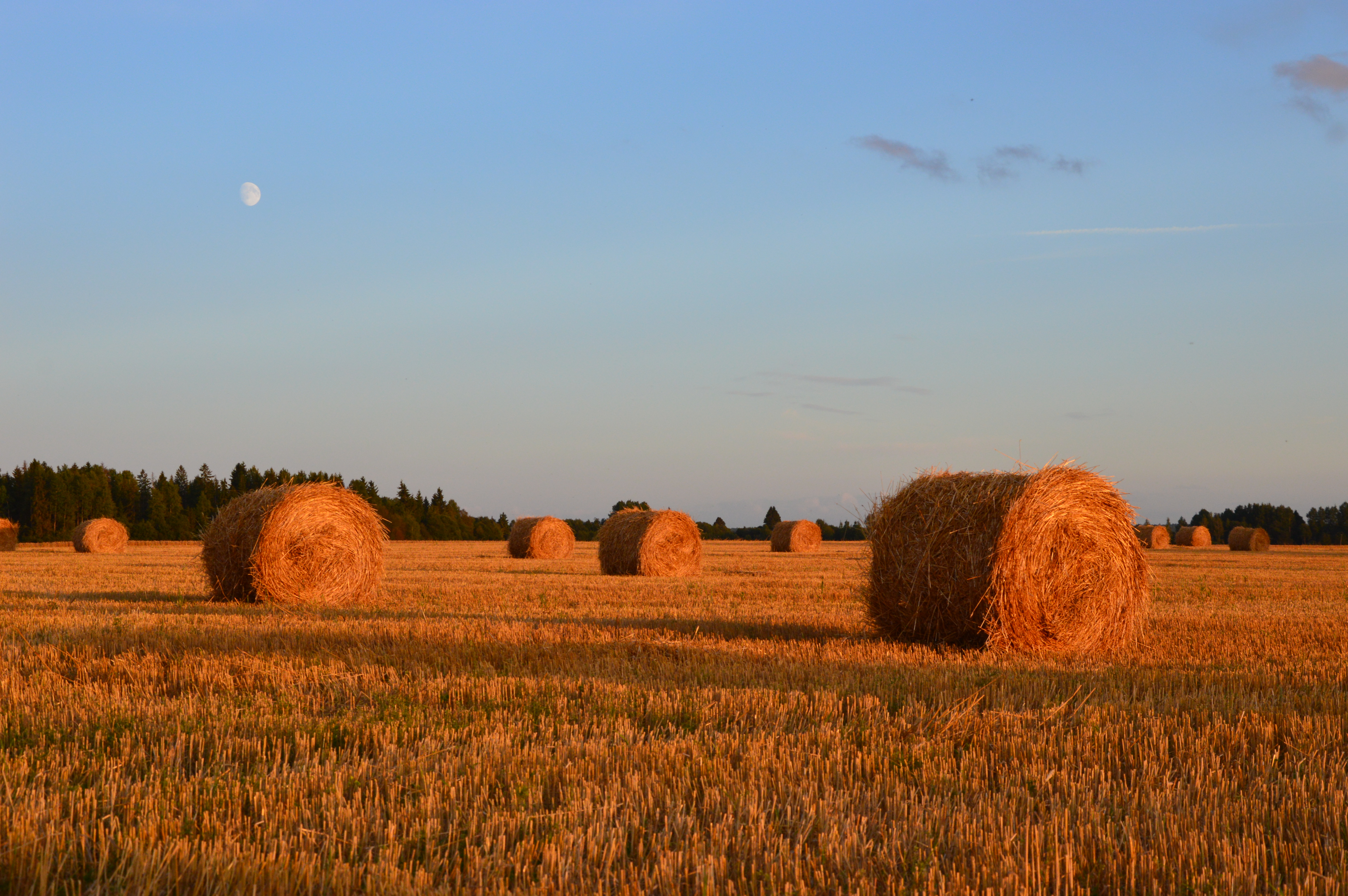 Võlle küla põllud Kose vallas.